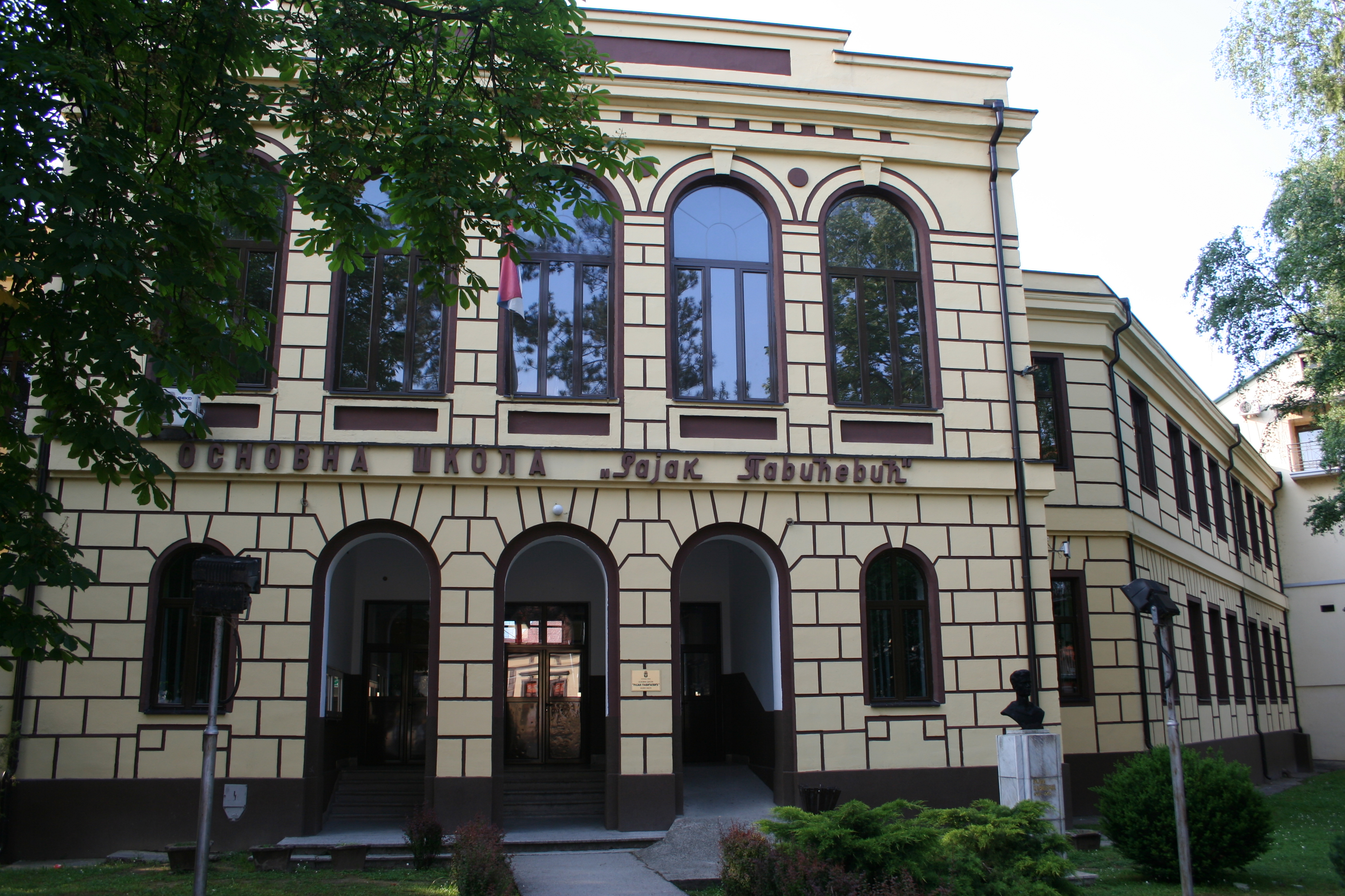 Bajina Bašta u maju 2017.